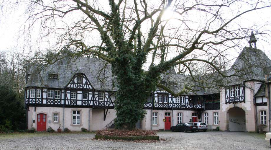 Beschreibung: Schloss Eller, Schlosshof mit Wirtschaftsgebäuden und Torhaus Quelle: erstellt am 19.02.2006 Fotograf oder Zeichner(in): Marie-Luise Carl Andere Versionen: GenWiki